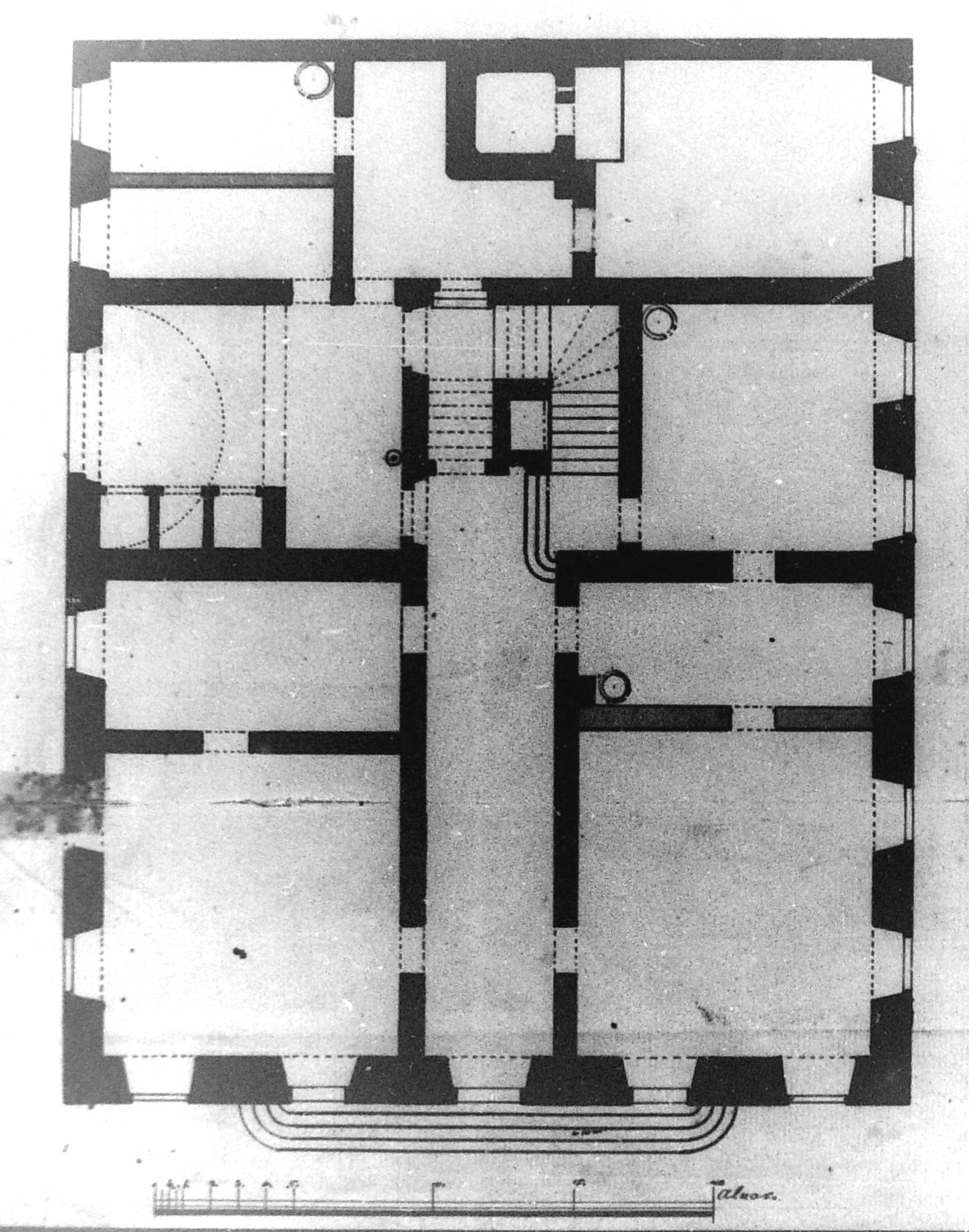 Pauliska huset, Skeppsbron 26, planritning, bottenplan